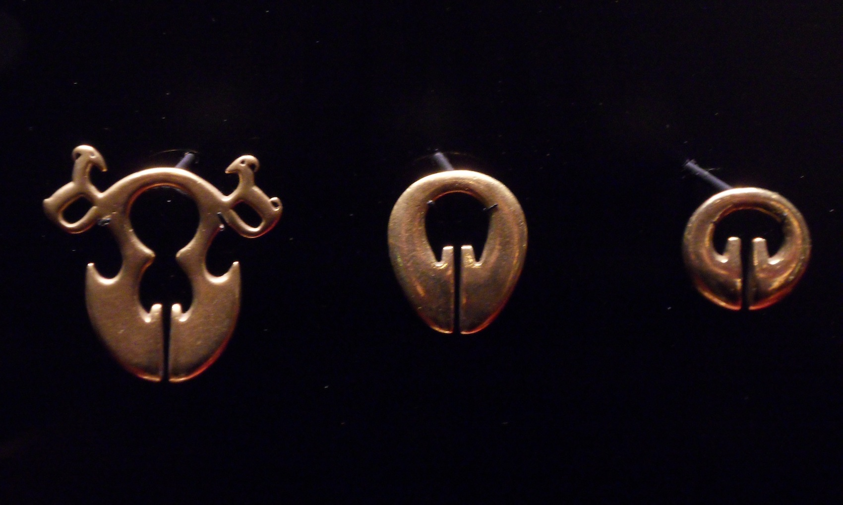 3 lingling-o du Musée du Quai Branly n° 70.2001.27.815, 70.2001.27.814 & 70.2001.27.813